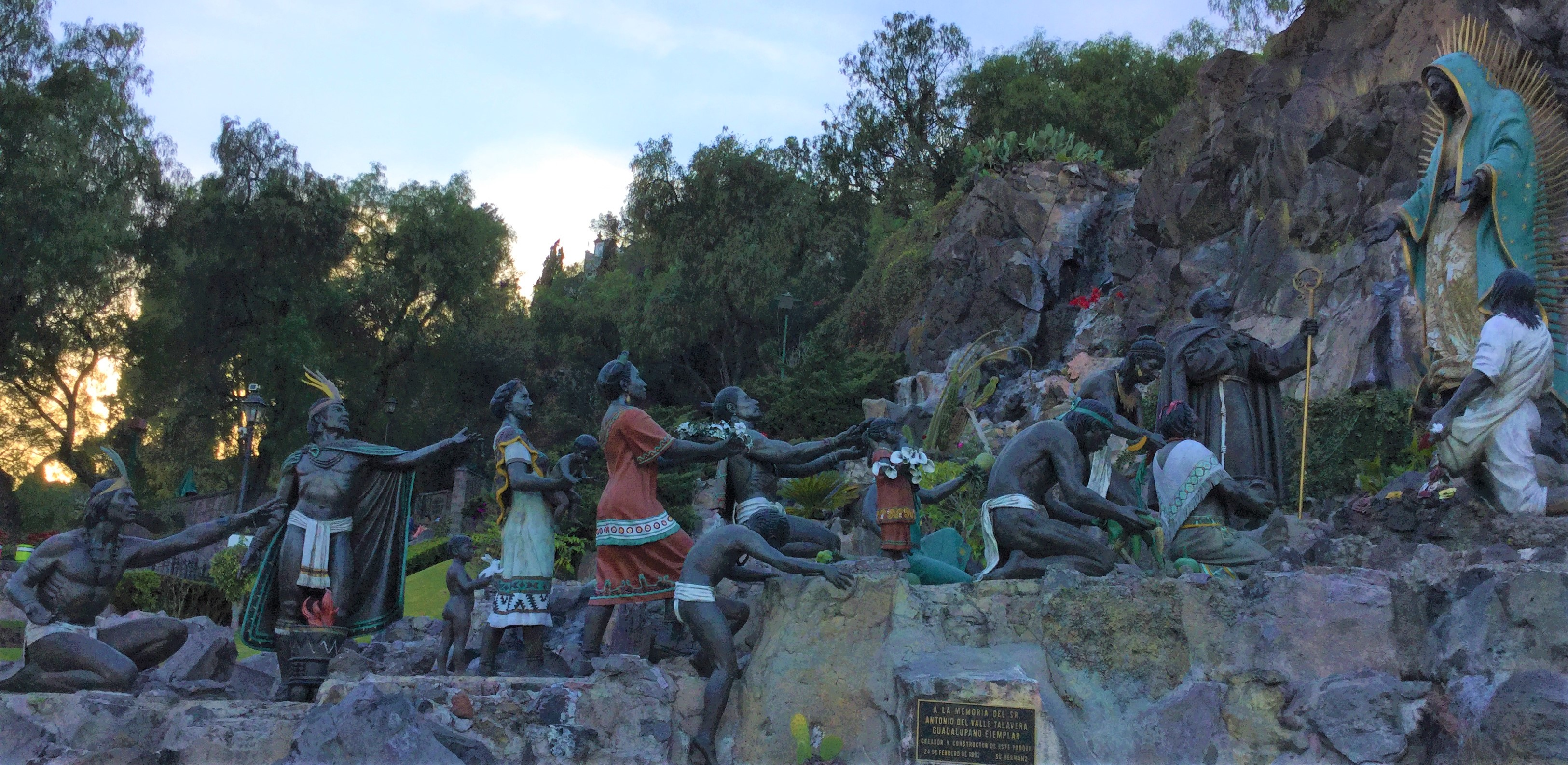 Representación de unos indígenas (aztecas) venerando la Virgen de Guadalupe en la Basílica de Cd. de México